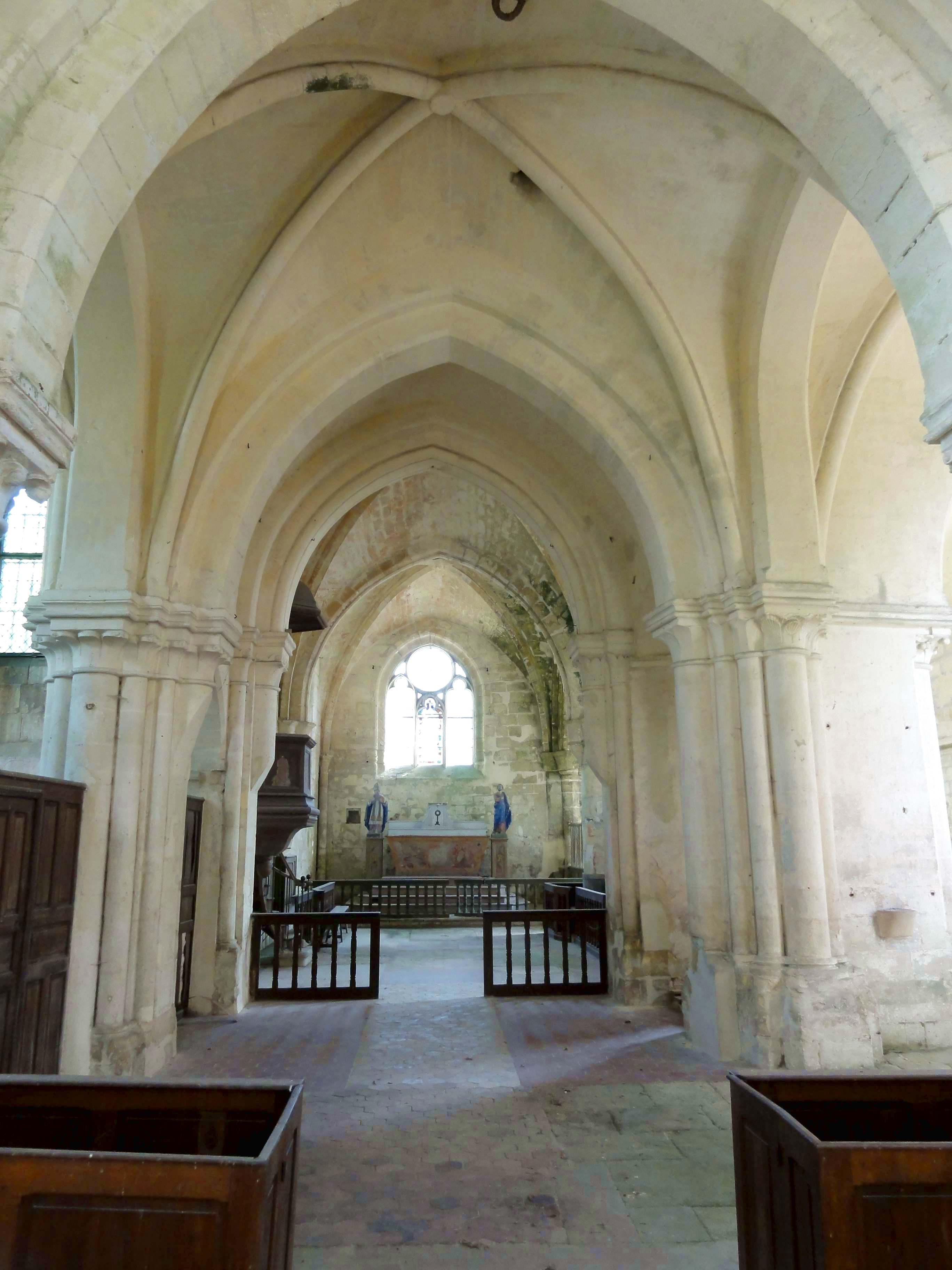 Intérieur de l'église - voir titre.